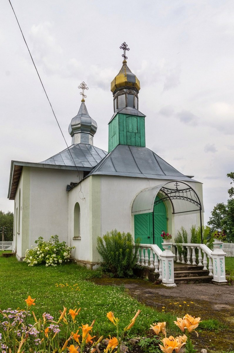 Псуя. Царква